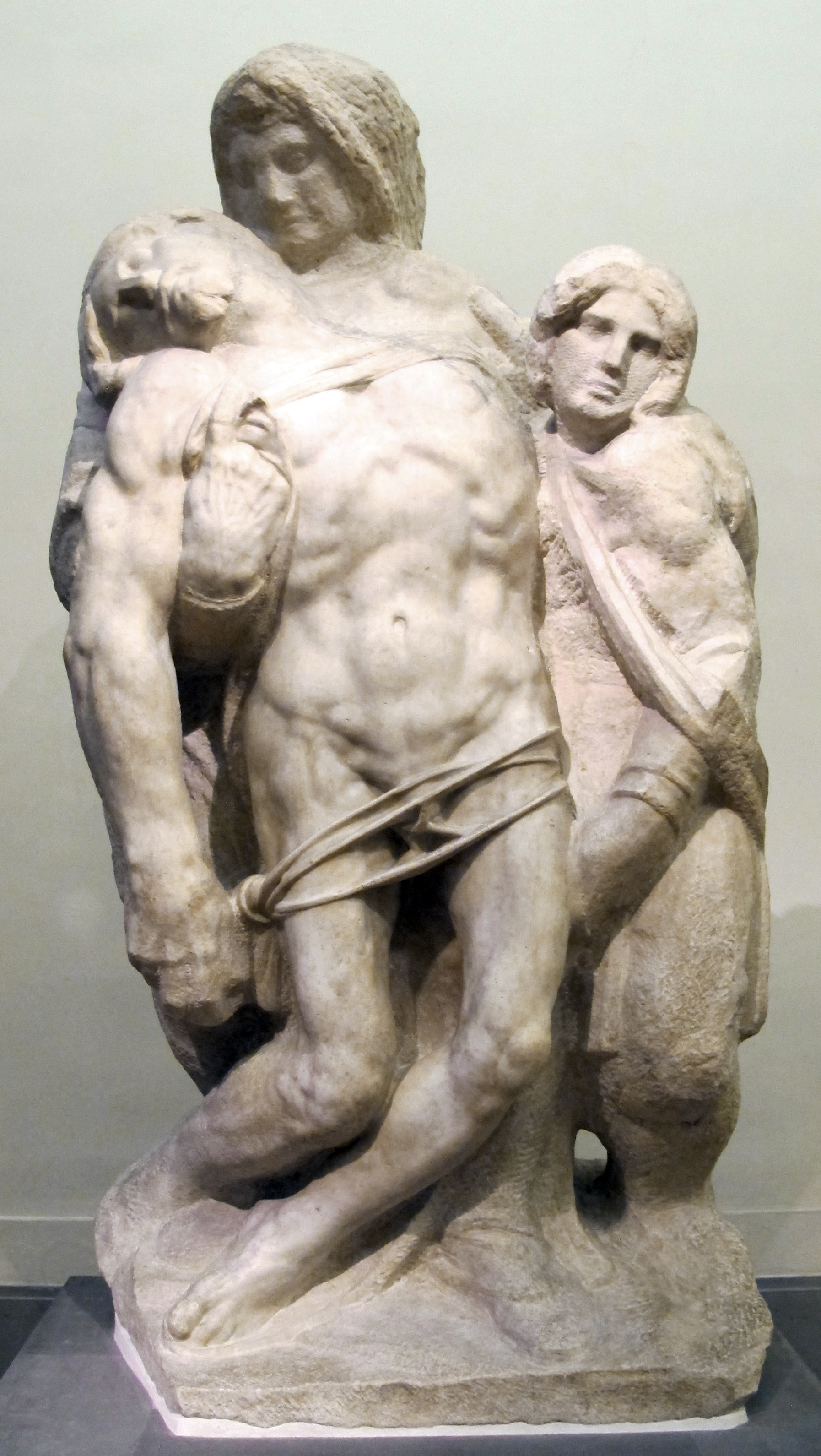 Galleria dell'Accademia, Florence